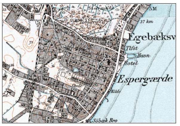 Espergærde 1947